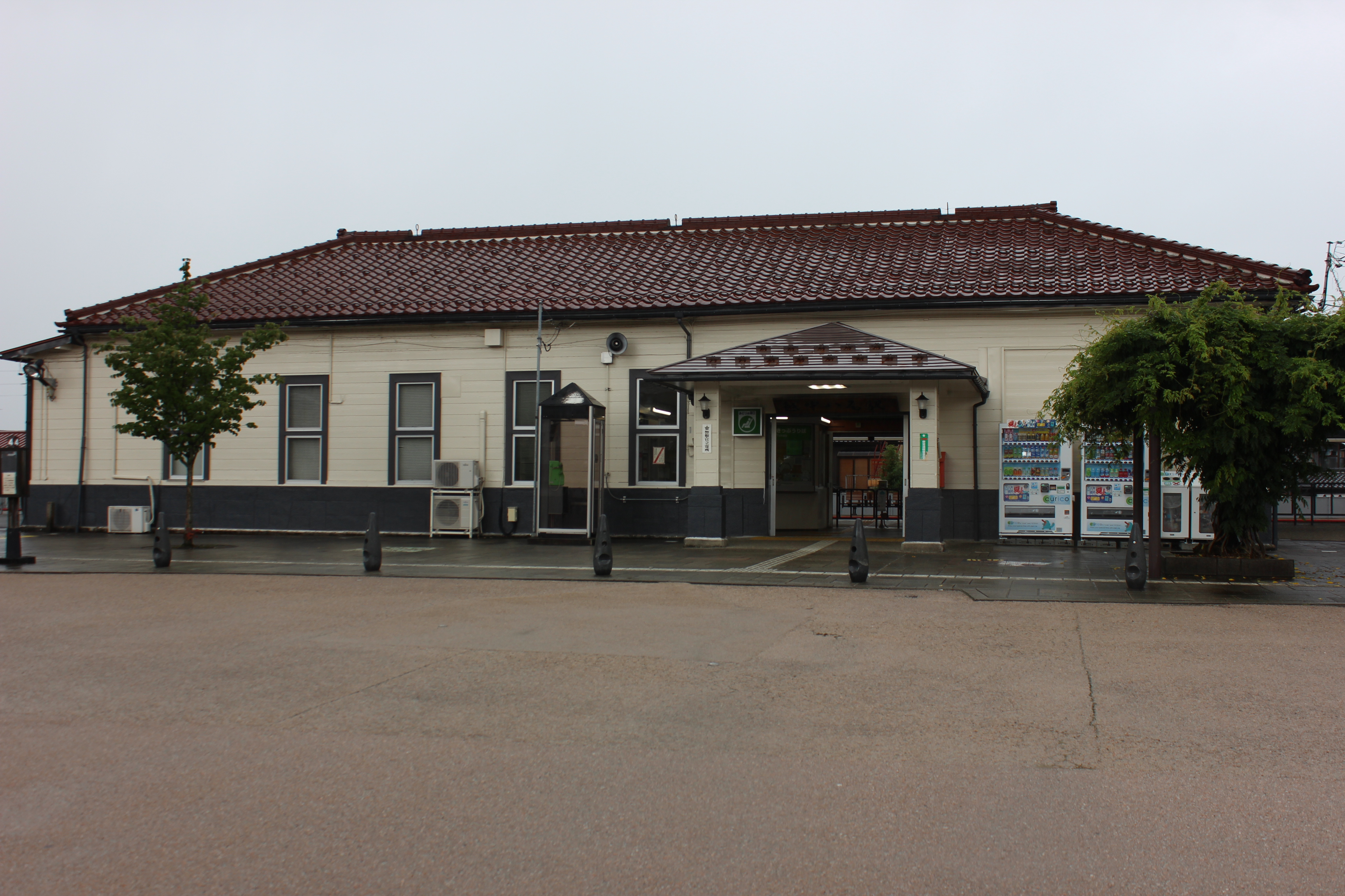 越中八尾駅（富山県富山市） Canon EOS Kiss X5